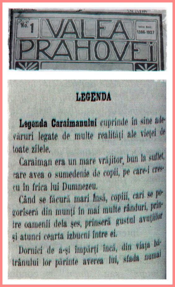 Extras din Legenda Caraimanului apărută în anul 1927 în revista Valea Prahovei nr. 1/1927, pag. 16 - 17